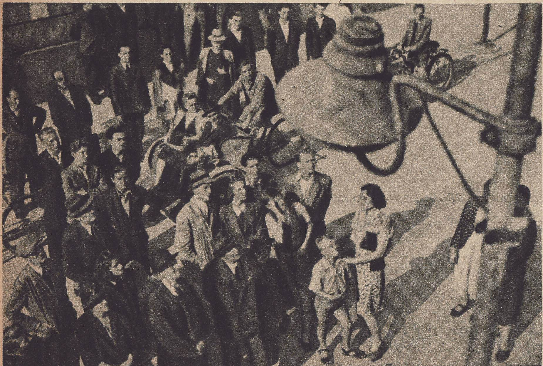 Kadr z filmu fabularnego Zakazane Piosenki nakręconego w 1946 roku w zburzonej Warszawie.